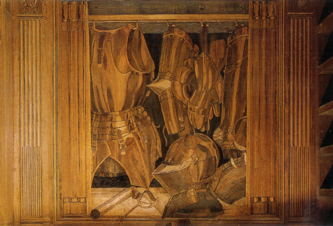 Mosaic woodwork, Studiolo; Baccio Portelli, le armi del duca, dallo studiolo di federico da montefeltro